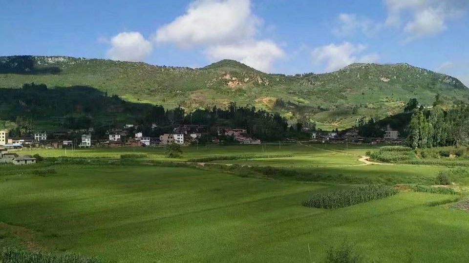 石林县路南坝